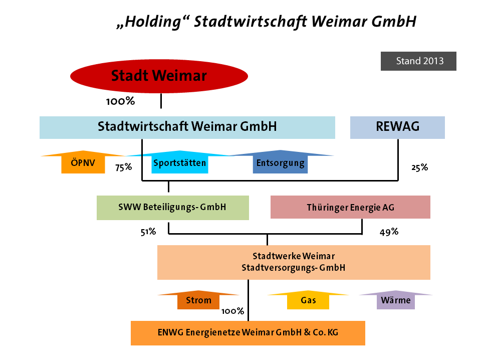 Grafik Struktur und Beteiligungen der Stadtwerke Weimar Stadtversorgung-GmbH (SWW)